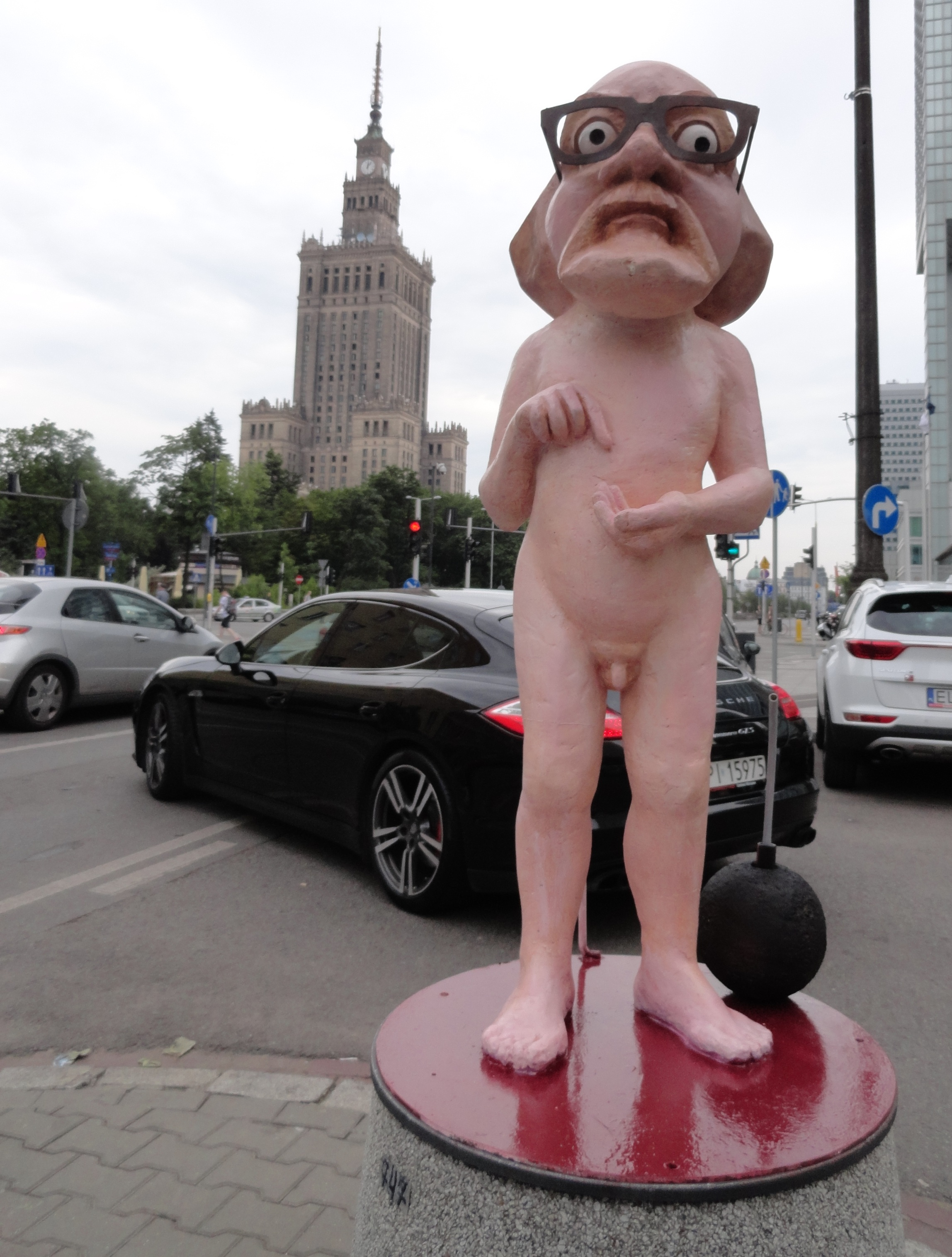 Włapko w Warszawie